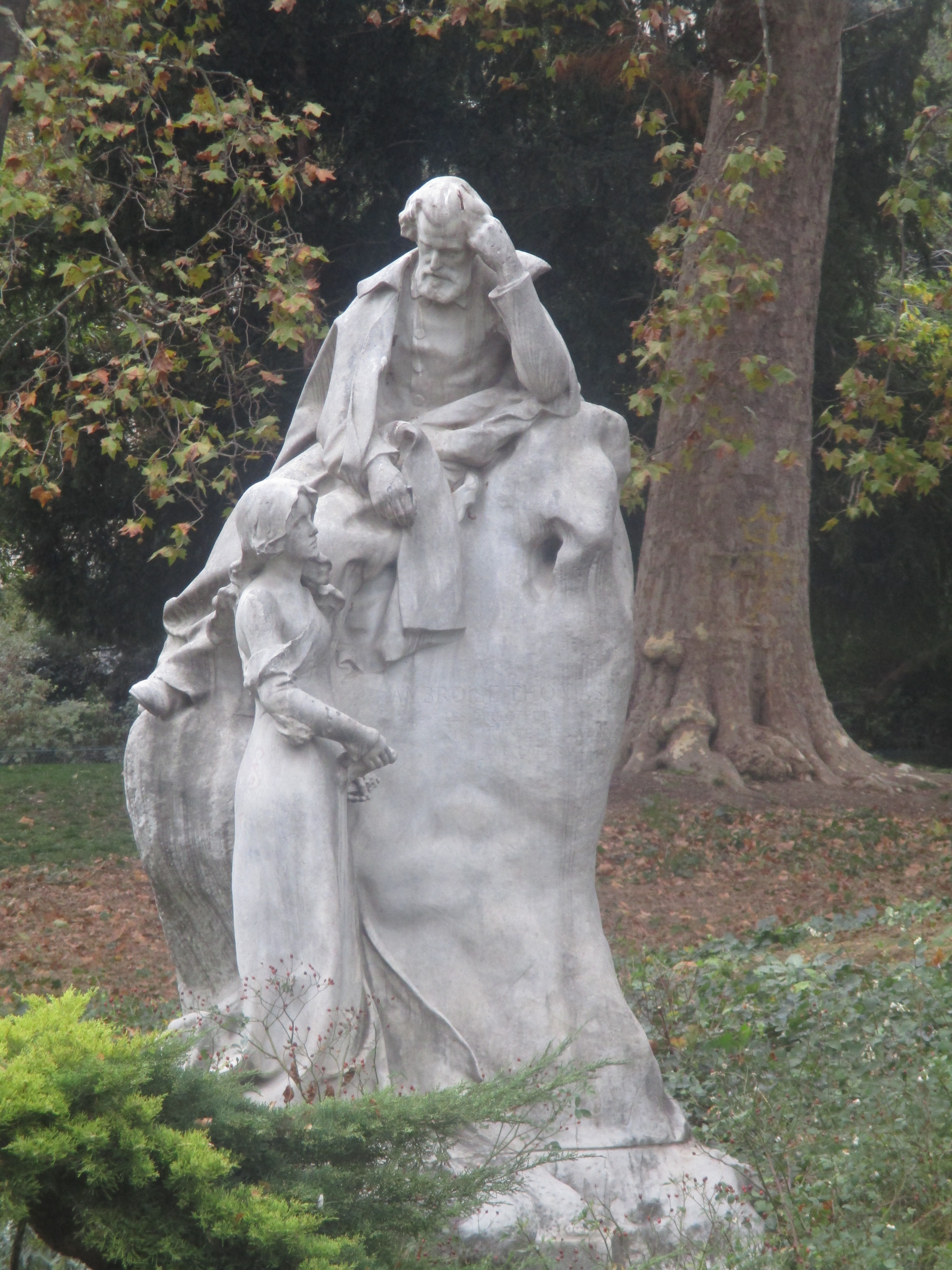 Parc Monceau ː Monument à Ambroise Thomas d'Alexandre Falguière, installé en 1902.